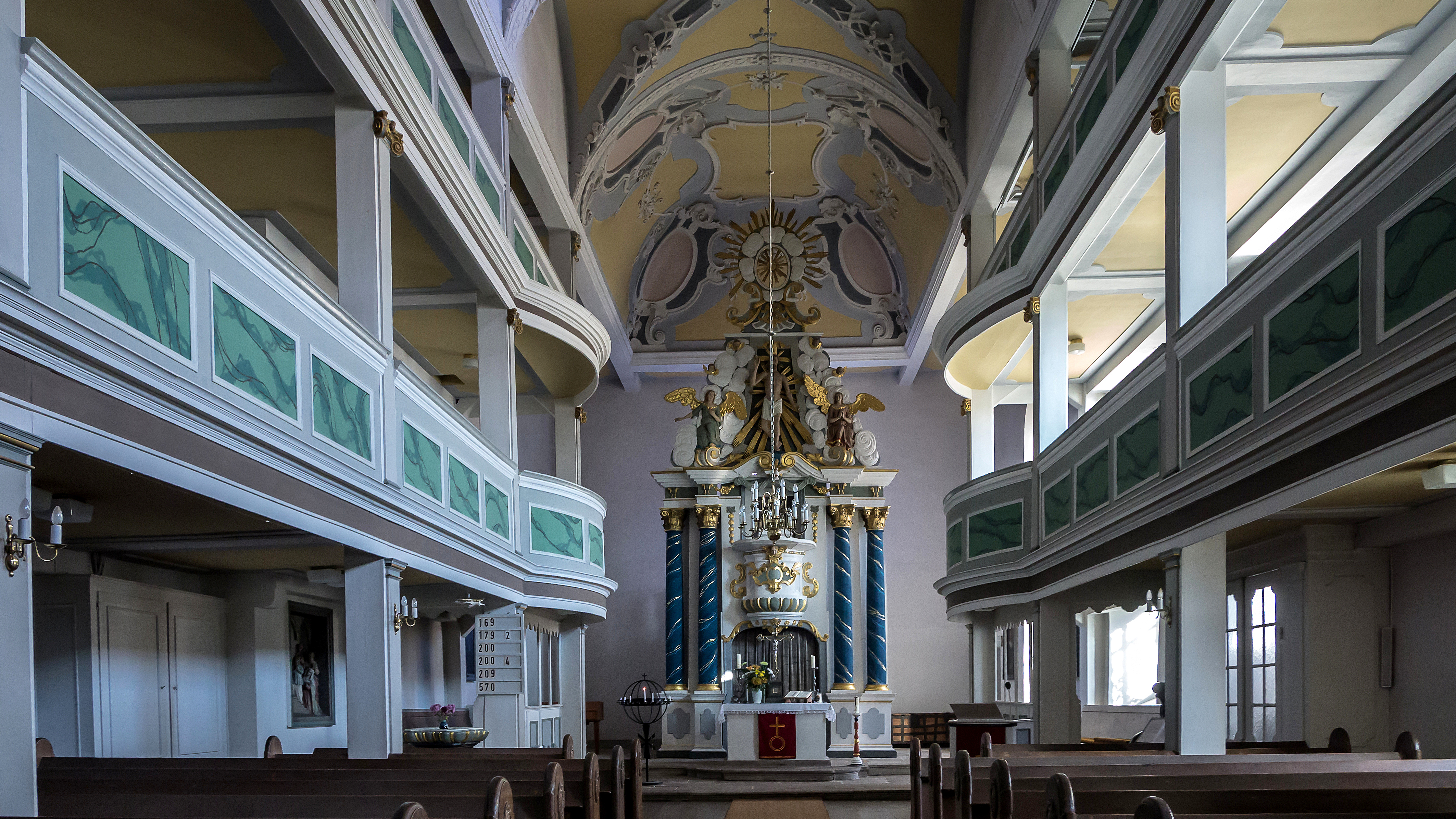 Bad Berka Pfarrgasse St.Marien 1 Chor